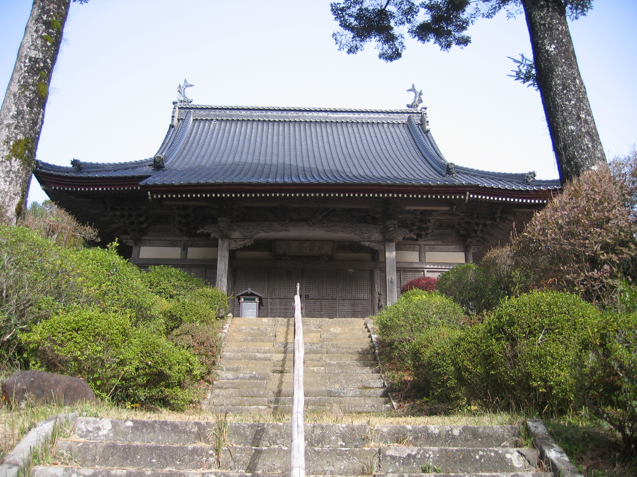 高野寺（灌頂堂）本堂